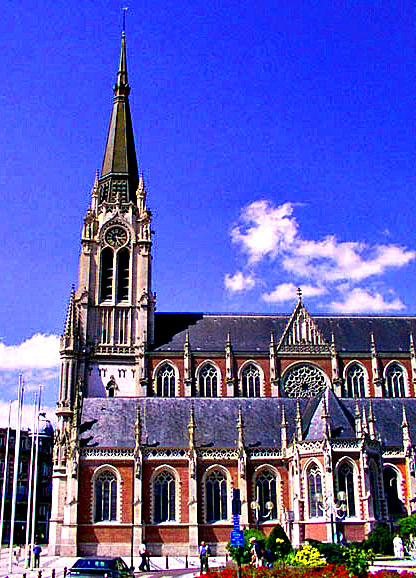 église Saint-Christophe de Tourcoing